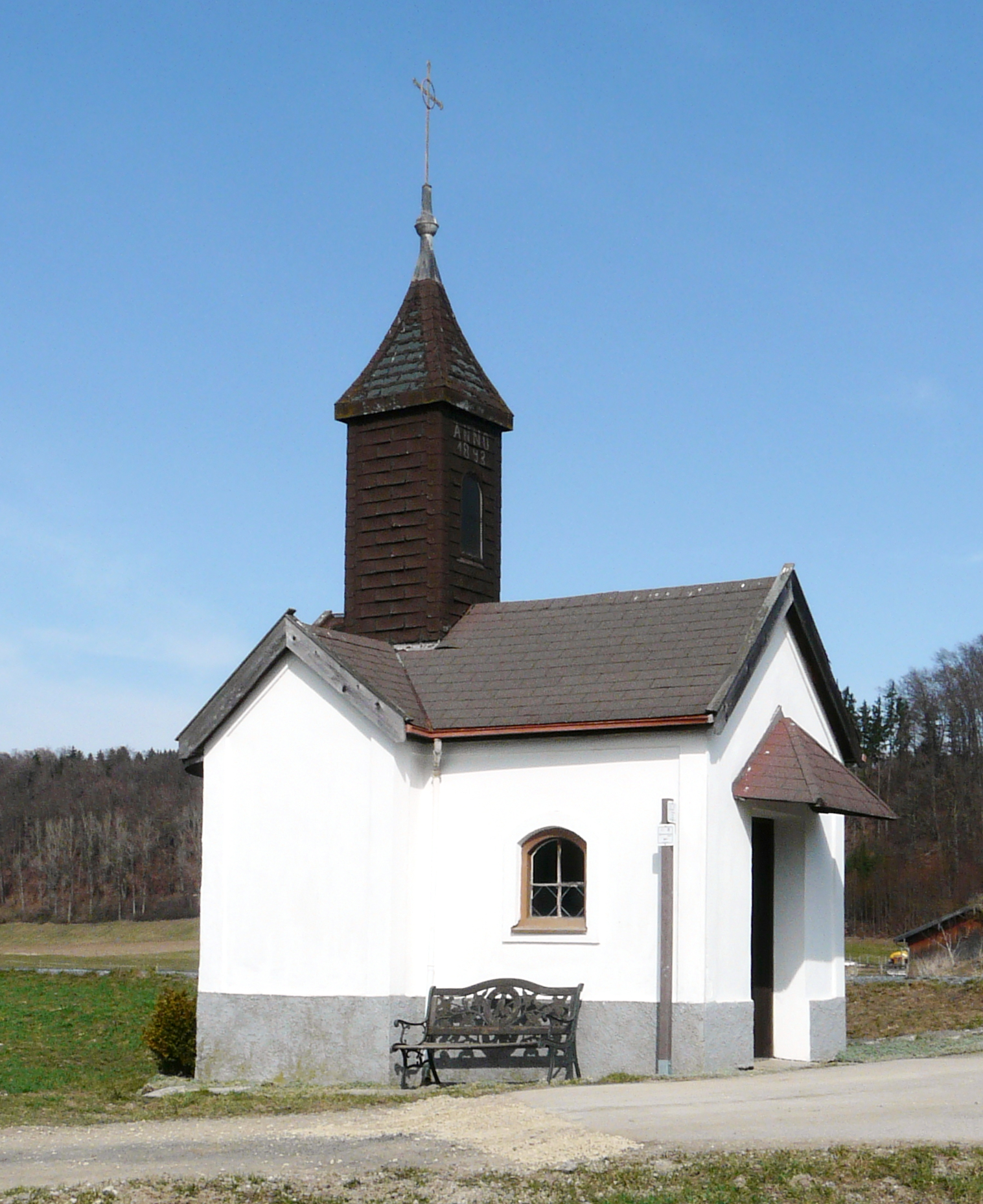 Kapelle in Erlstätt an der St2095